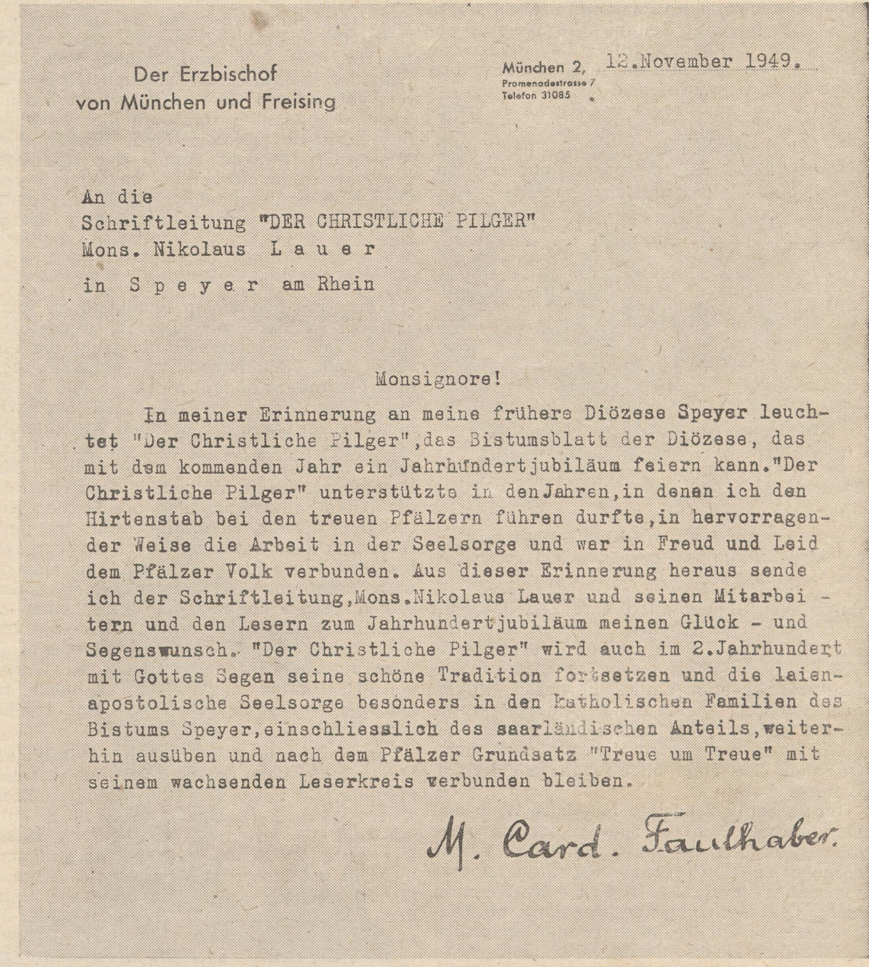 Kardinal Faulhaber, Glückwunschschreiben von 1949 für die Bistumszeitung Pilger in Speyer.